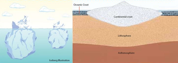 Konsep ISostasi